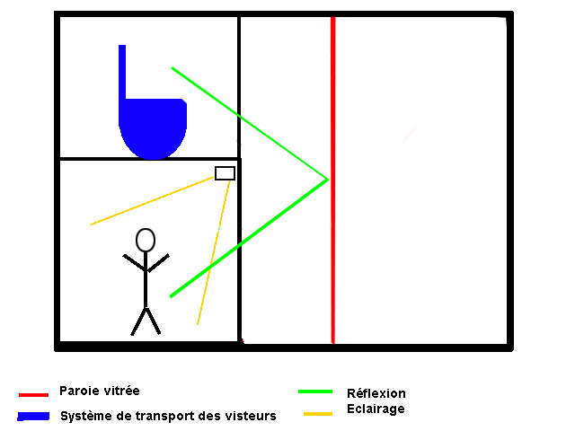 Schéma d'explication du système Grim hosts utilisé dans l'attraction Haunted Mansion/Phantom Manor de Disney. Le système n'est pas breveté par Disney. Schéma réalisé par Gdgourou le 06/11/2005 et modifié par Outsunrise le 26/11/2015